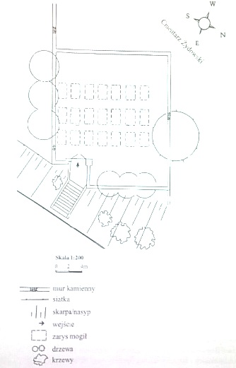 Szkic cmentarza mahometańskiego w Suwałkach. Źródło: Karty cmentarzy zabytkowych (Ośrodek Ochrony Zabytkowego Krajobrazu - Warszawa)